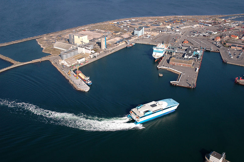 Rønne Havn med Villum Claussen - IMO: 9216250 - Call Sign: OYVY